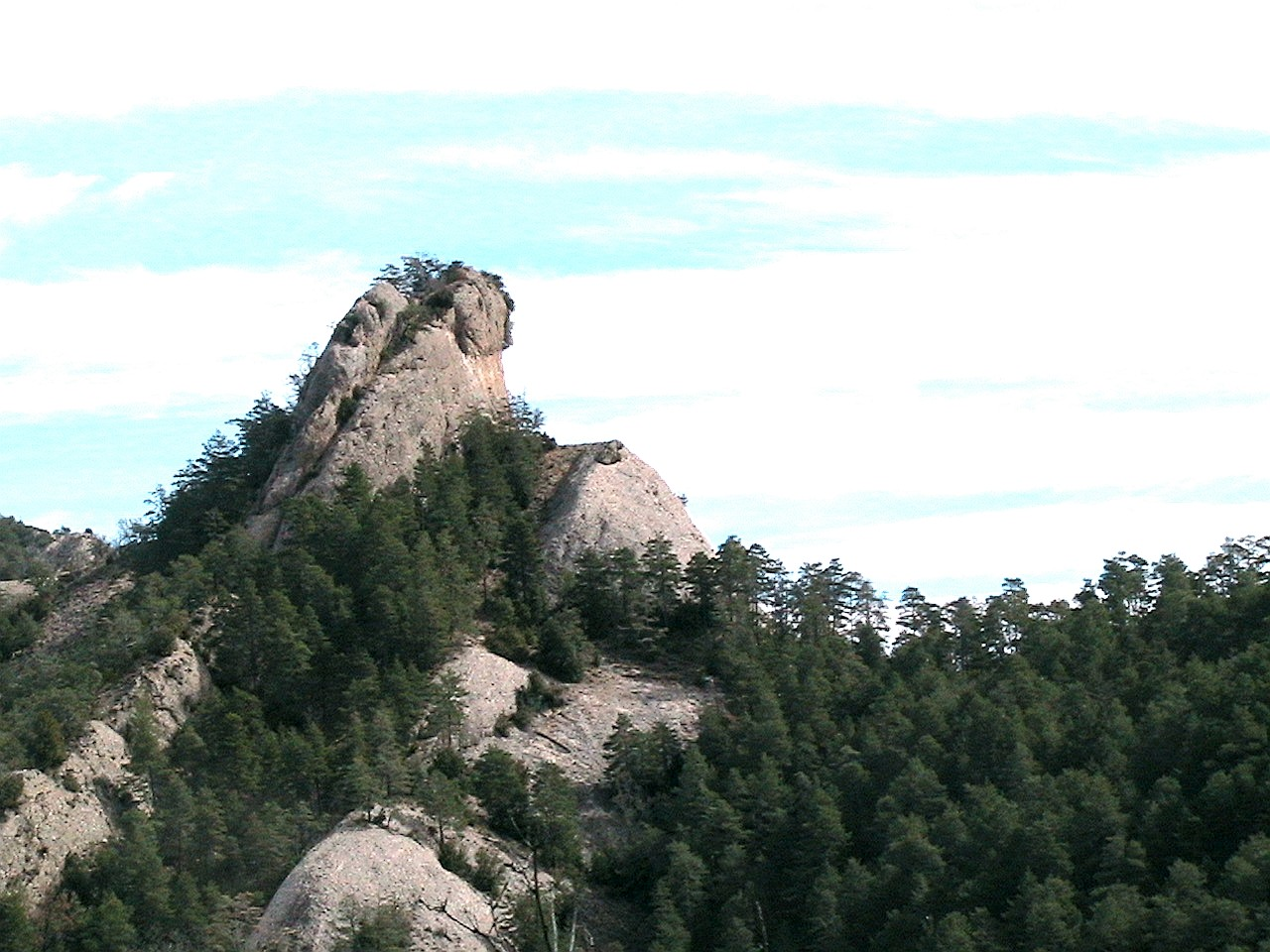 El Coll de Vera, amb la seva caracterìstica agulla, vist des del Coll de la Maçana.